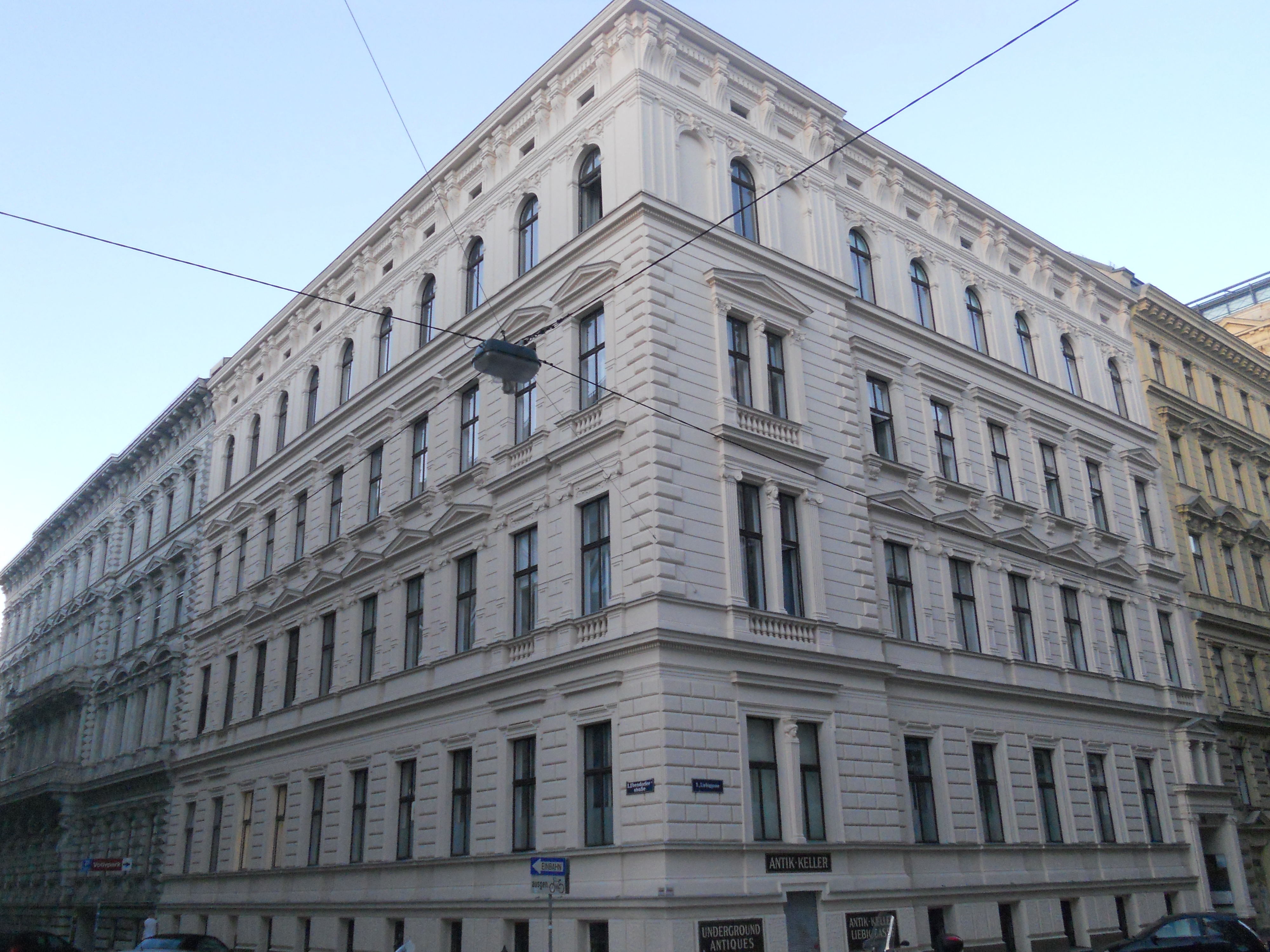 Miethaus